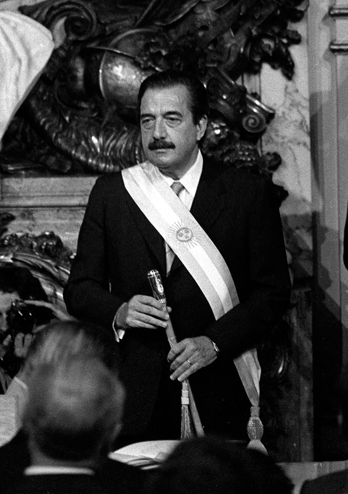 Raúl Alfonsín, asumiendo como presidente de Argentina en 1983.